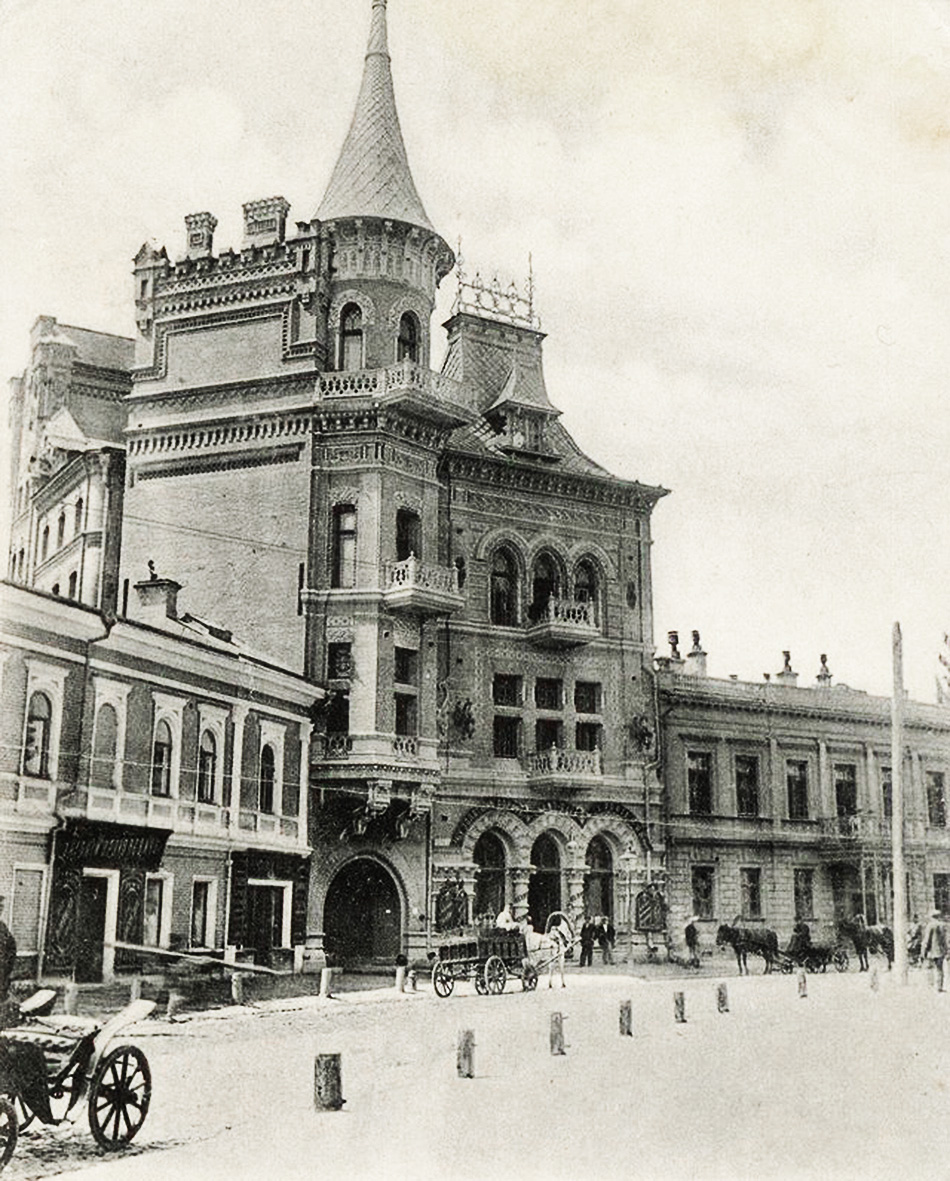 Будинок Підгорського. Київ, вул. Ярославів Вал, 1